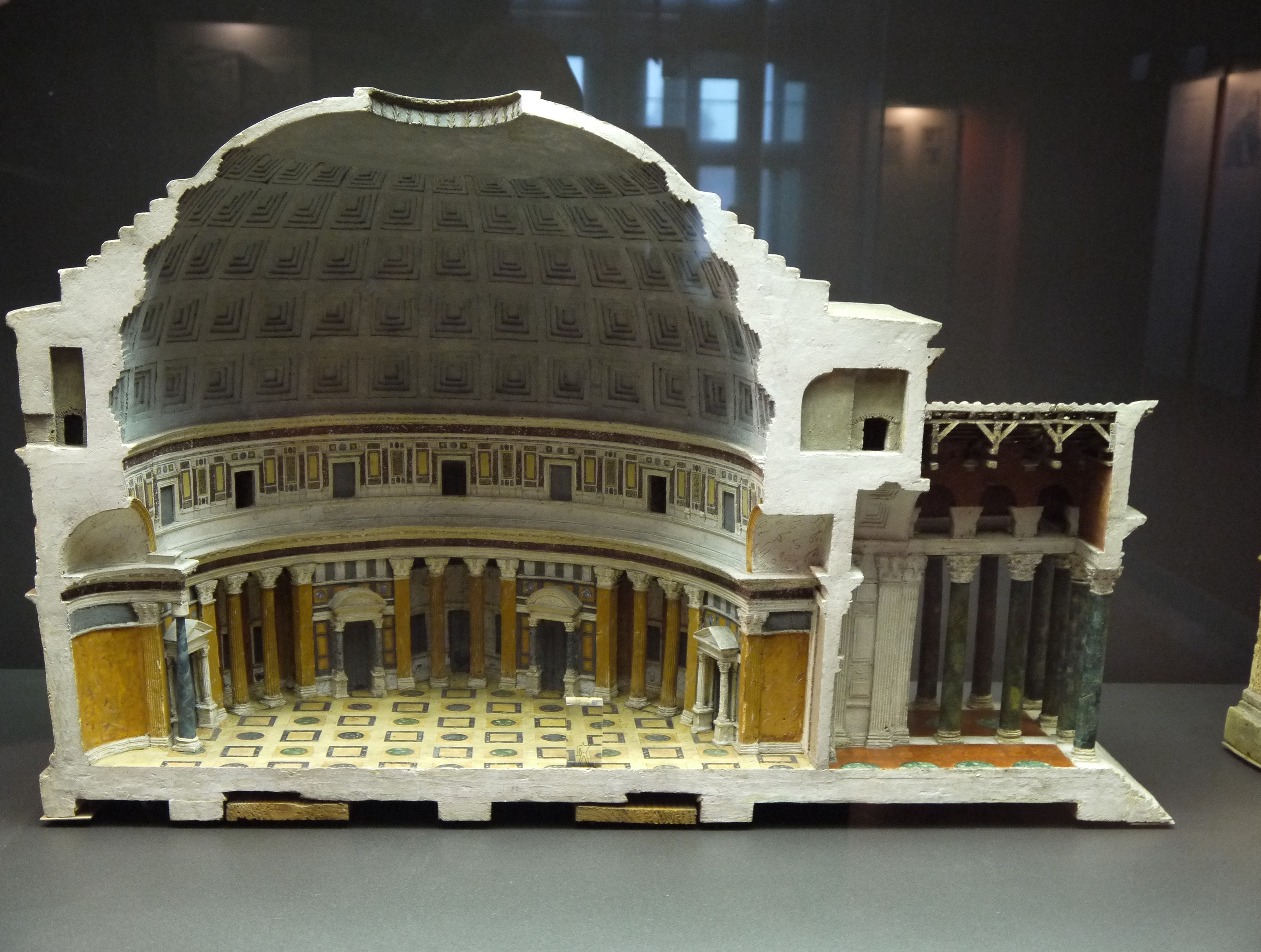 Korkmodell des Pantheons aus der Werkstatt von Carl May und seinem Sohn im Schloss Johannisburg in Aschaffenburg